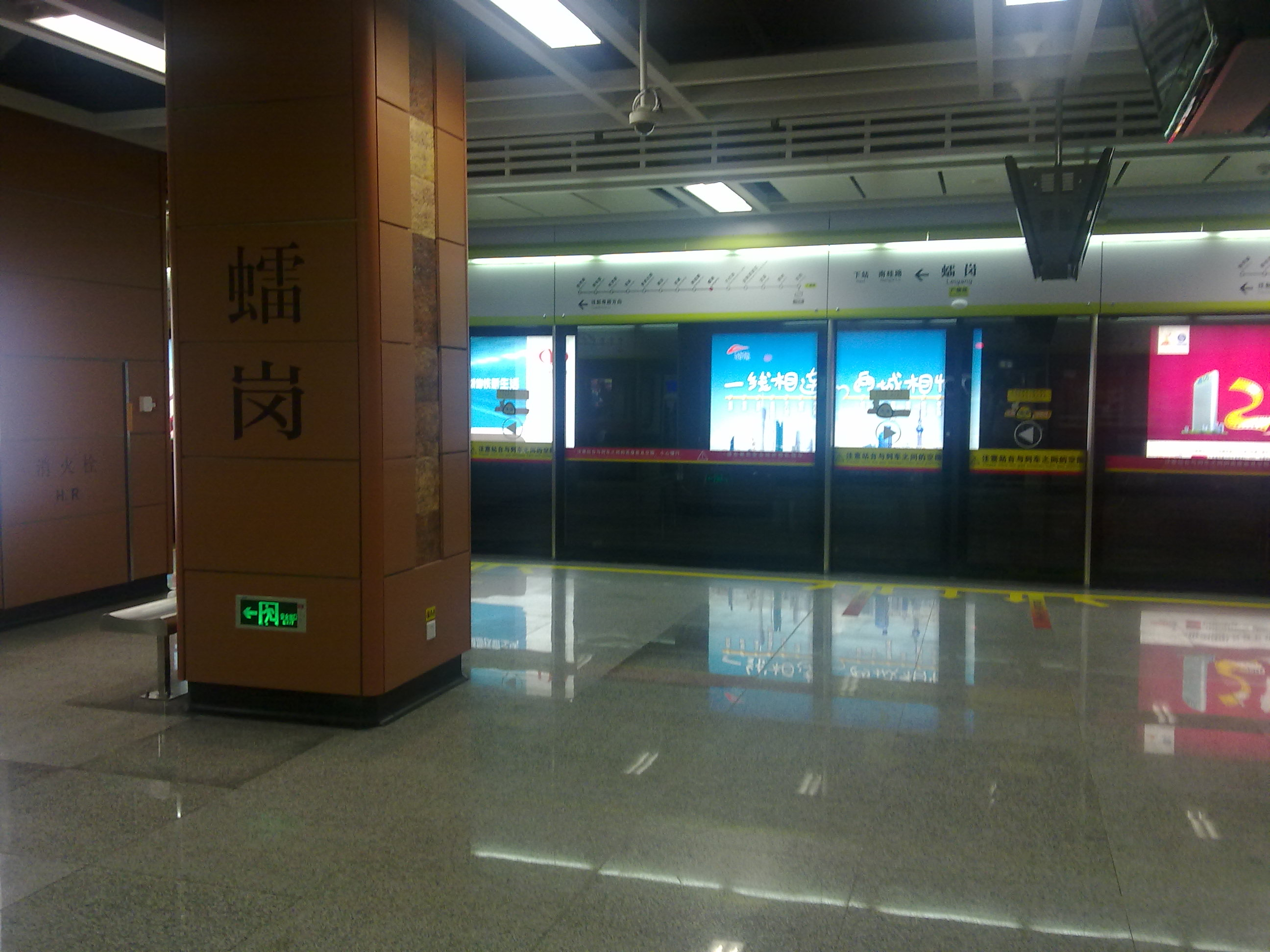 廣佛地鐵(虫雷)崗站站台